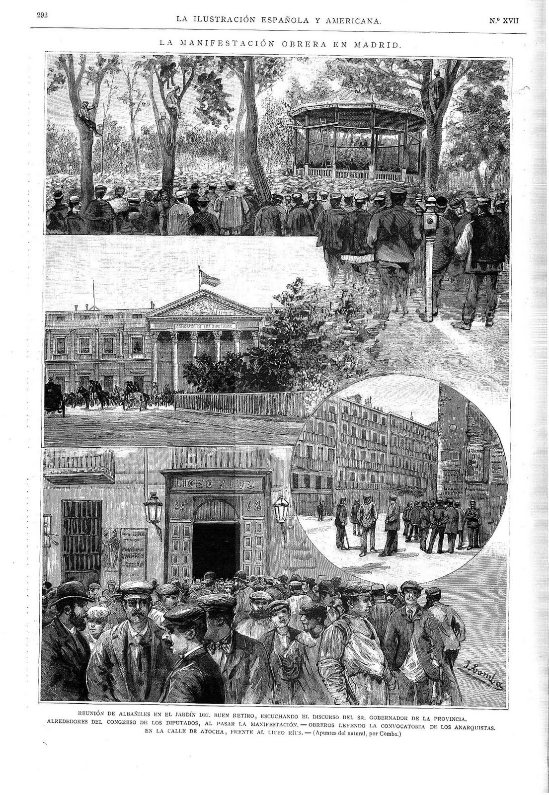 La Ilustración Española y Americana, 8 de mayo de 1890, dibujos del natural de Juan Comba. Distintos momentos y enclaves con motivo de la manifestación obrera ocurrida en Madrid el 4 de mayo de 1890